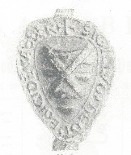 Zegel met wapen Dirk I van Wassenaer 1237. Origineel bevindt zich in het Rijksarchief.